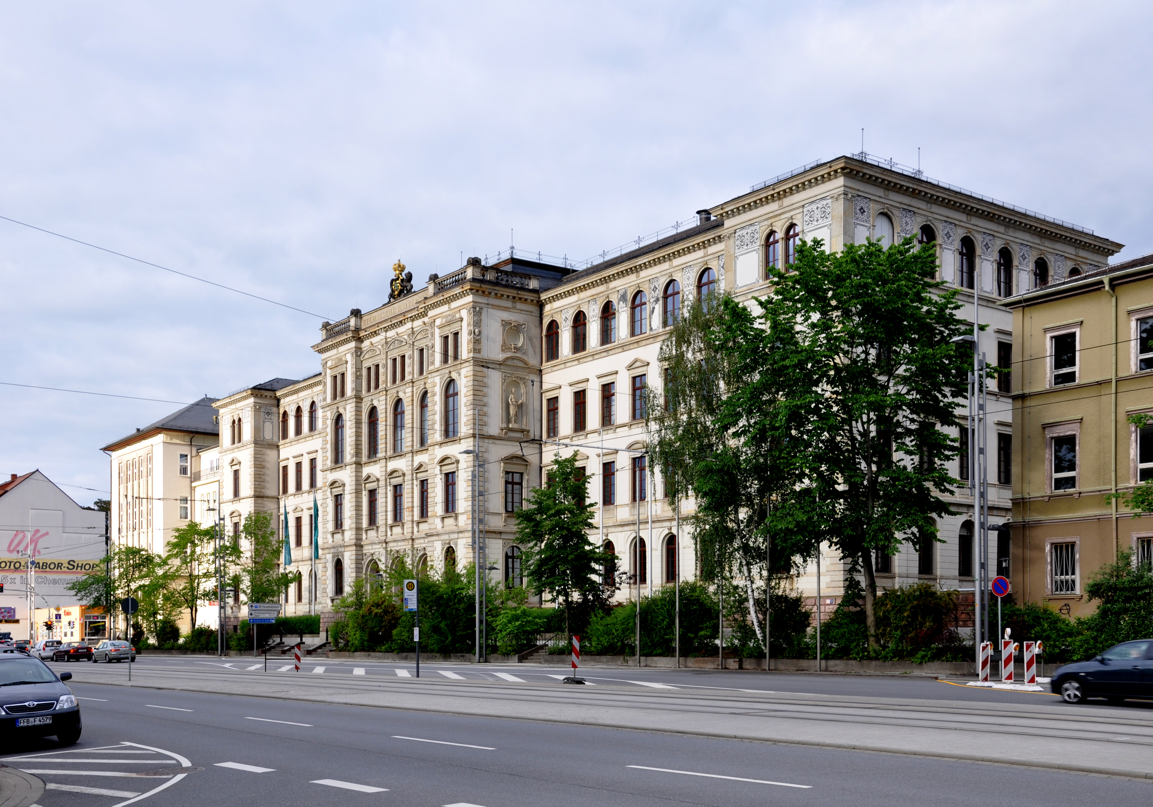 Chemnitz, Hauptgebäude der TU Chemnitz an der Straße der Nationen